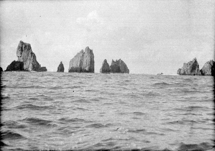 Negatief. Rotseilanden bij Batu Hulo (Pulu Pagger) aan de Zuidkust van Oost-Java